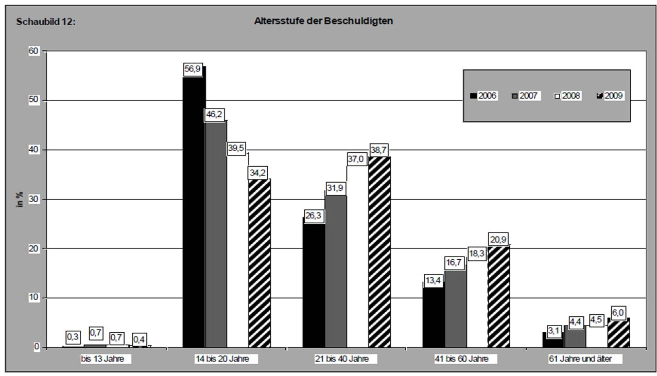 Die Statistik beschreibt für die Jahre 2006-2009 die Altersstruktur der in Strafprozessen beschuldigter Täter, die sich zu einem Täter-Opfer-Ausgleich bereit erklärt haben